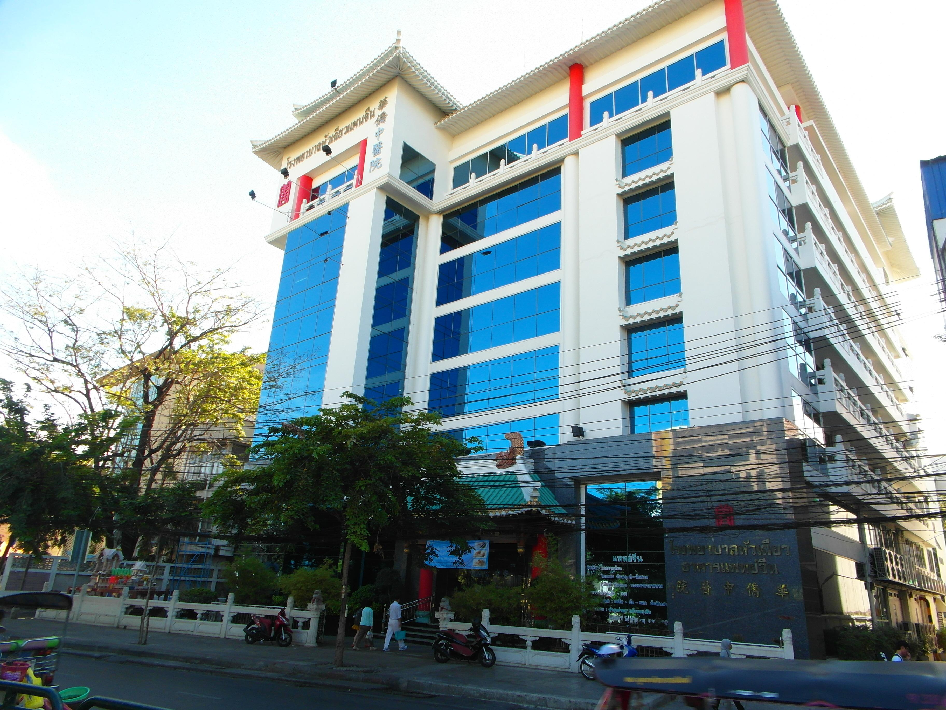 Bangkok 2013 april